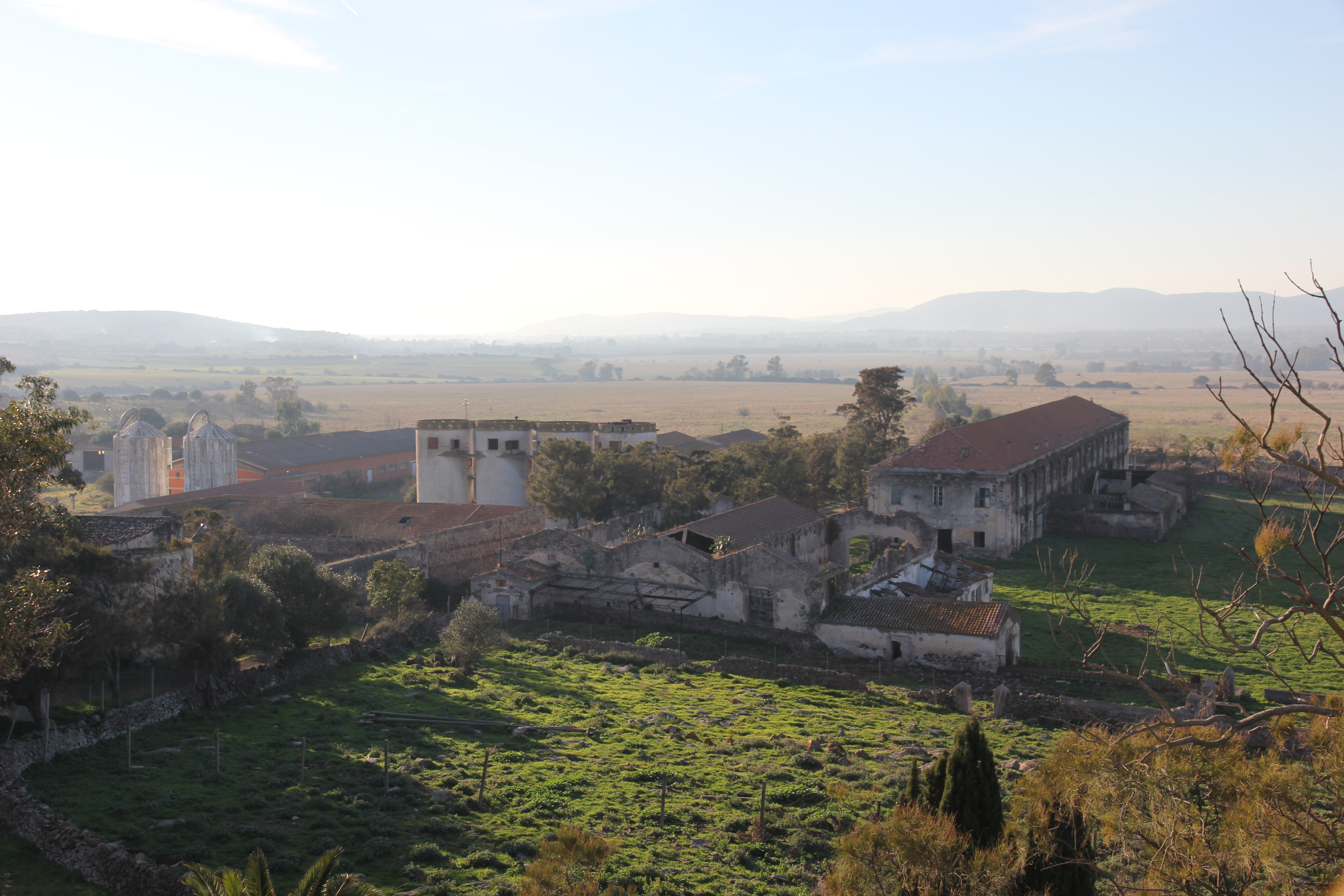 Alghero - Azienda Surigheddu